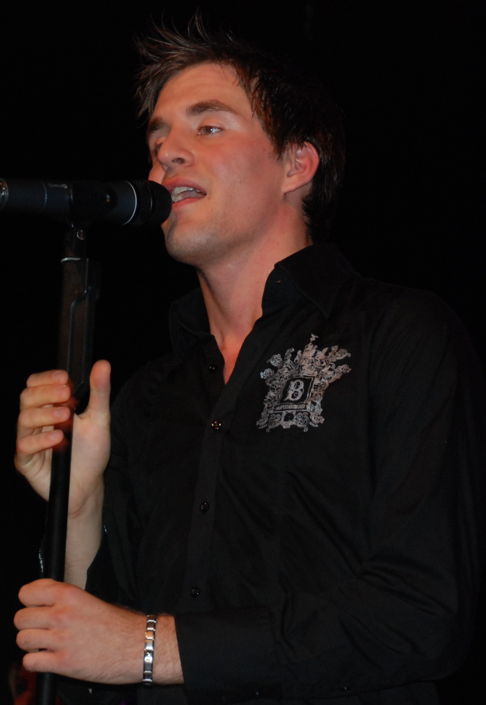 Alexander Klaws live in Ahlen 16.08.2008